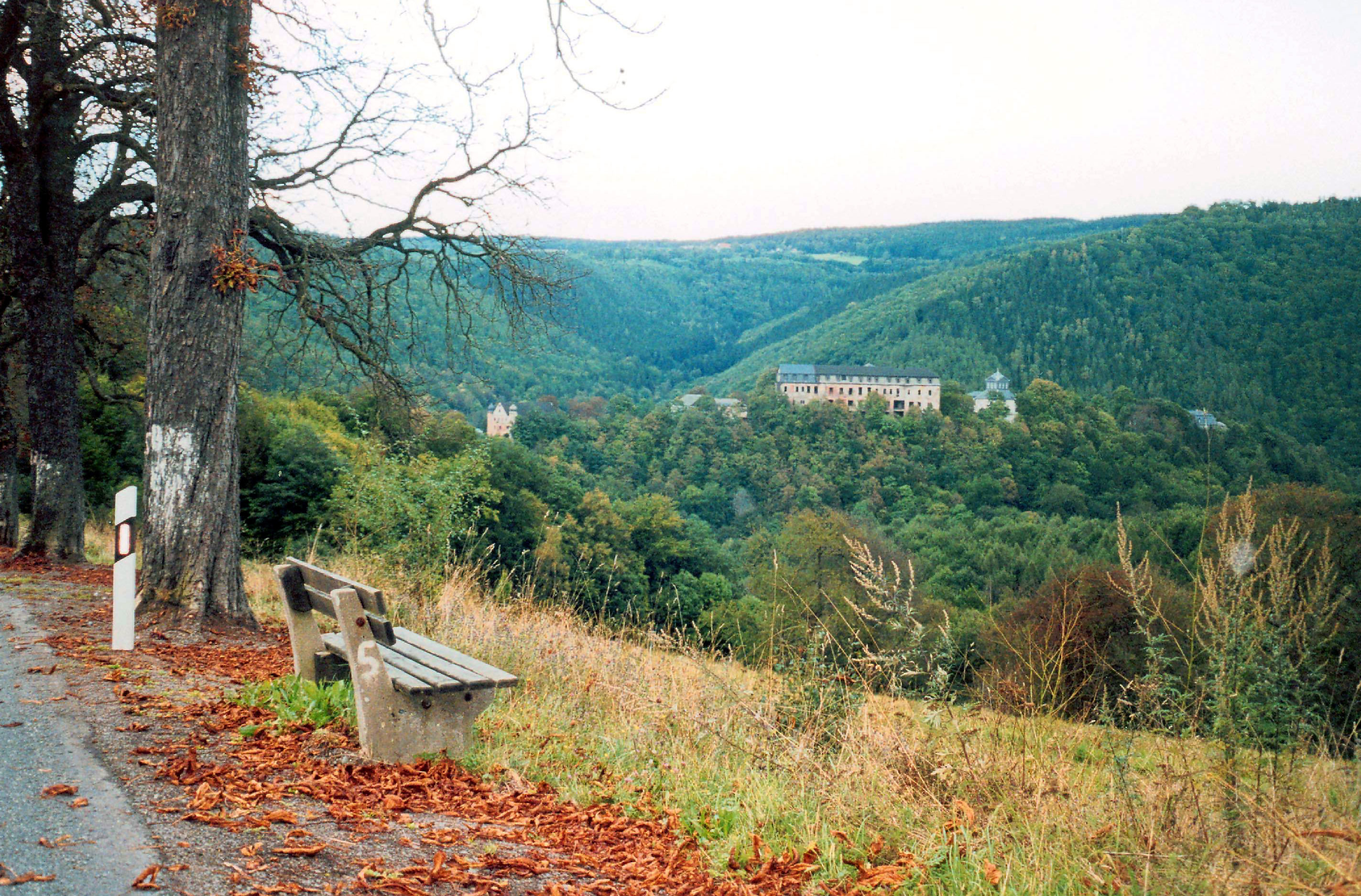 15.09.2002 07427 Schwarzburg (Mittleres Schwarzatal): Die Schwarzburg von Westen. Schloß, 1071 als "Swartinburg" urkundlich genannt. Nach Bränden 1736-1744 als Barockbau erneuert. 1940 zum Umbau als "Reichs-Gästehof" vorgesehen, Bauarbeiten 1942 eingestellt. Kaisersaal von 1695 mit reichen Stuckarbeiten (1971 restauriert). [F20020915A07]20020915080AR.JPG(c)Blobelt